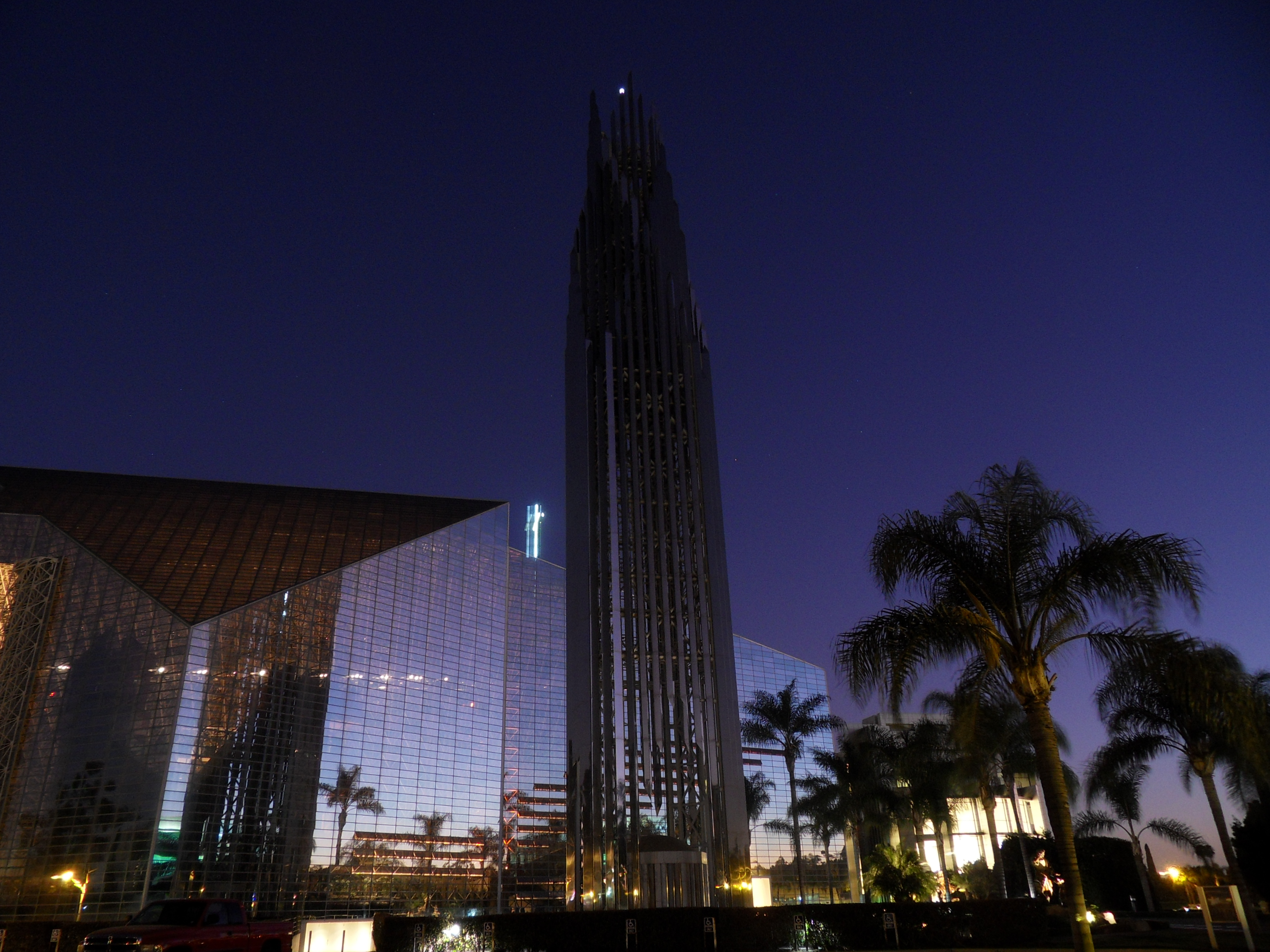 Crystal Cathedral, 's avonds genomen.